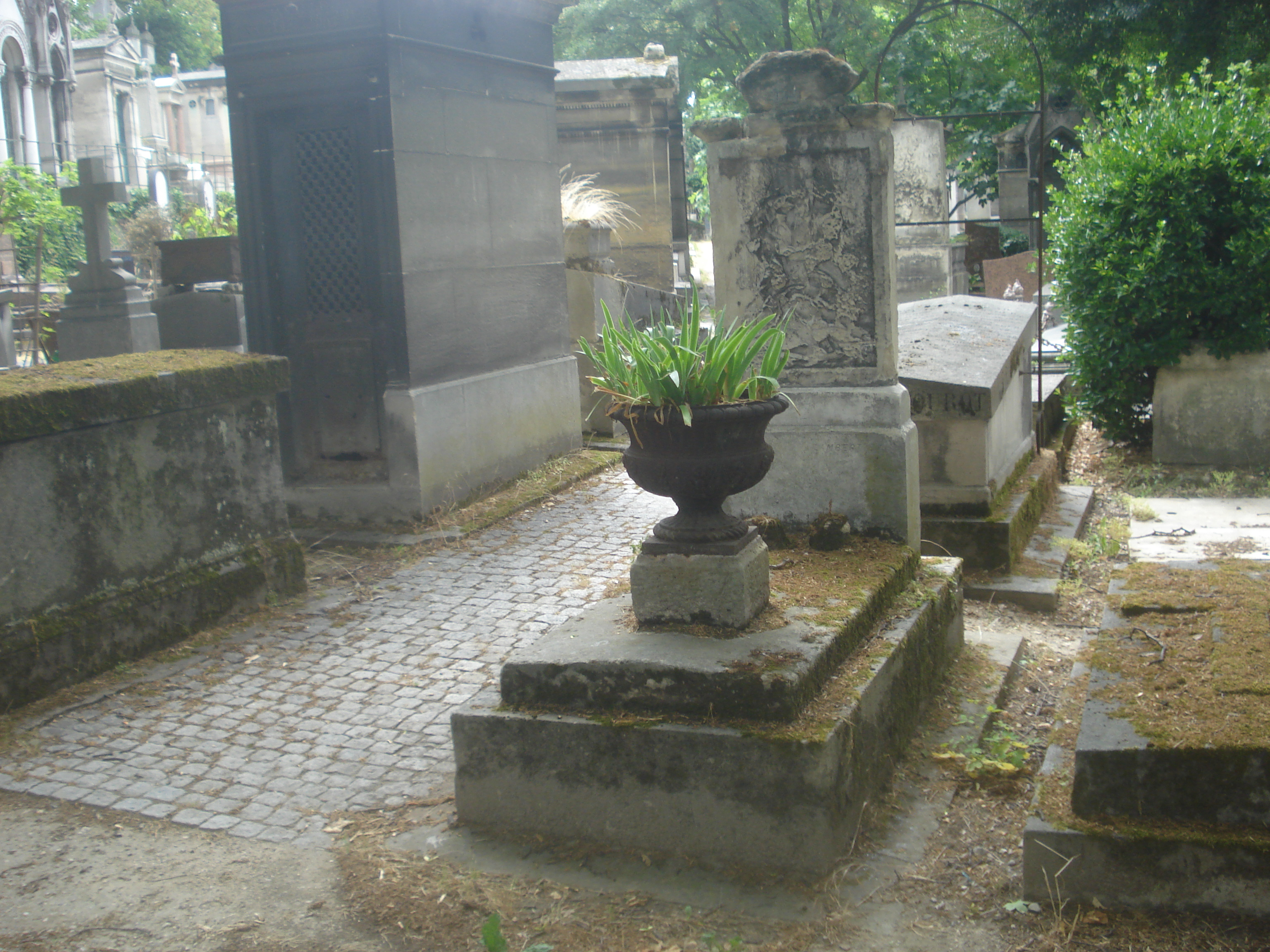 REYBAUD Marie-Roch-Louis, (1799-1879), économiste, journaliste, homme de lettres et homme politique. Il est né le 15 août 1799 à Marseille (municipalité du nord), décédé le 26 octobre 1879 à Paris 9e, (vue 13/31, acte n° 1371). Il est le fils de Louis Reybaud et Marie-Elisabeth Bosonnier. Il épouse Aimée Ber le 11 août 1836 à Paris. – BER Aimée, (1800-1887), épouse en 1ère noce de Félix-Justin Lafon, (1783-1835), et en 2e noce de Louis Reybaud, qu’elle épouse le 11 août 1836 à Paris. Elle est née à Marseille d’après son décès, (pas trouvée dans les tables de Marseille), décédée le 23 juin 1887 à Paris 9e, (vue 26/31, acte n° 900) Elle est la fille de François Ber et de Jeanne-Louise Perrin. Et autres membres de la famille, la concession date de 1842. La stèle est en partie détruite, le n° de concession est présent. La tombe est dans la 22e division, 1ère ligne, n° 35, avenue Cordier, concession n° 580P-1842.